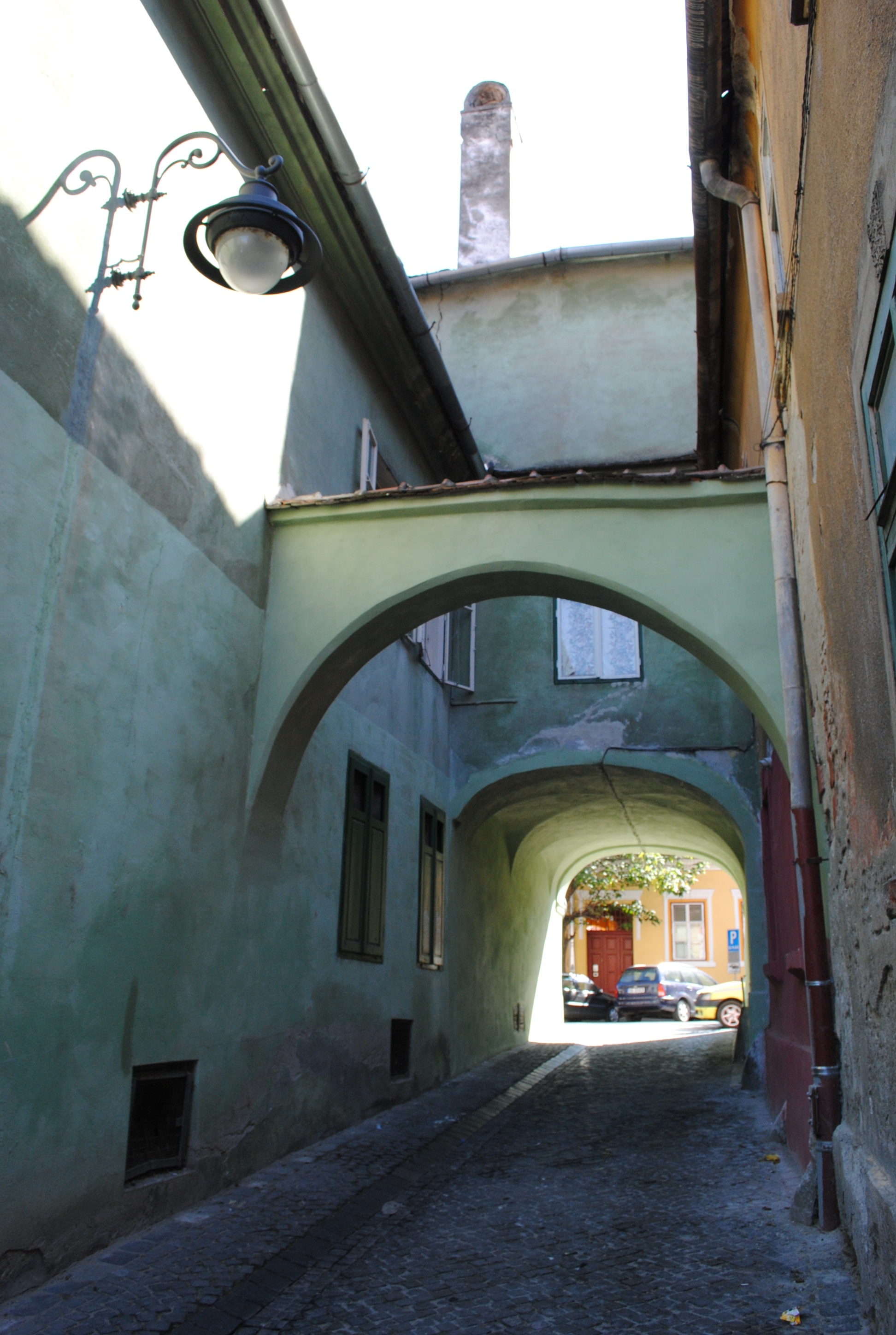 Casă, sec. XVIII